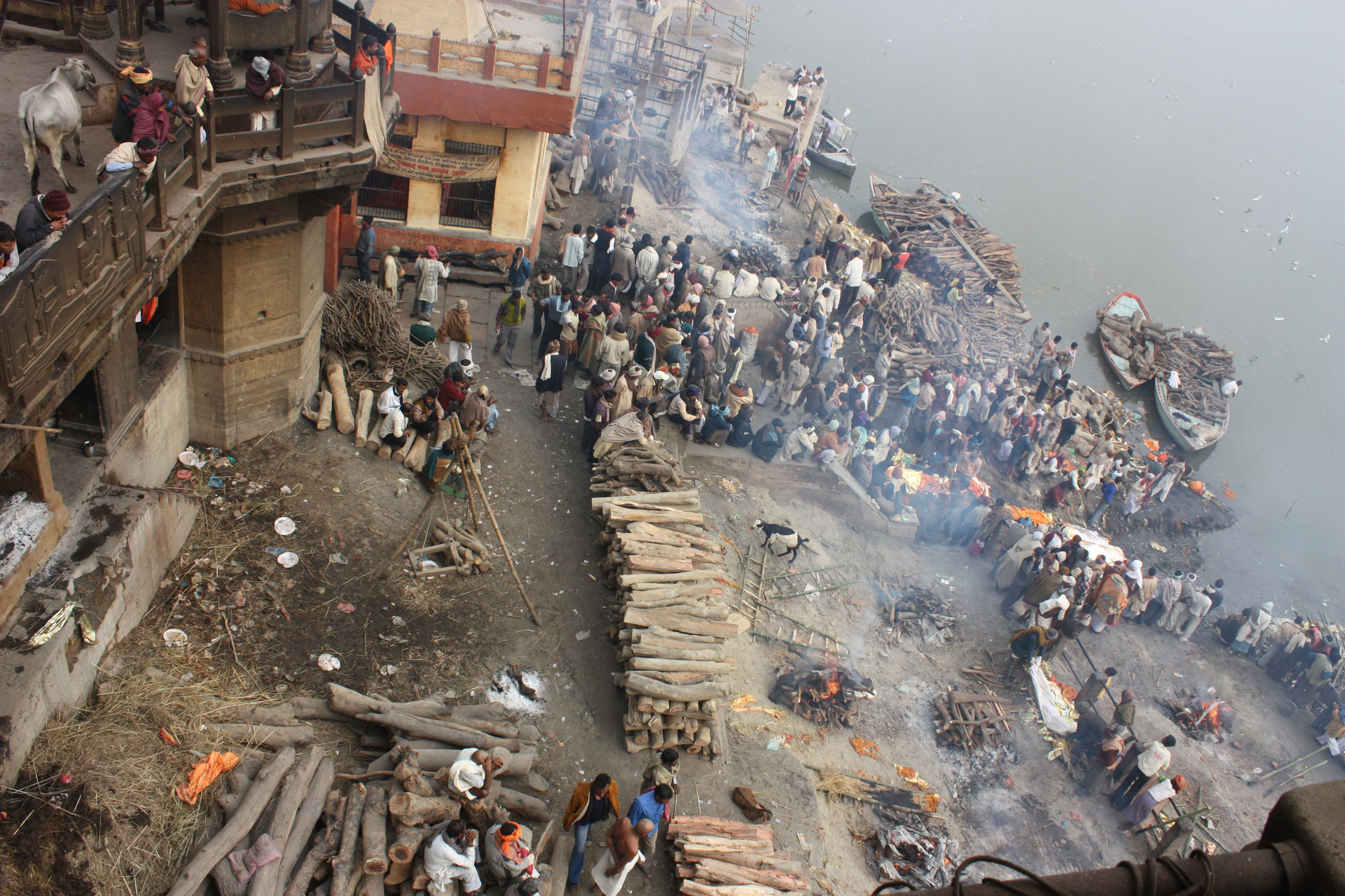 Varanasi, Manikarnika Ghat